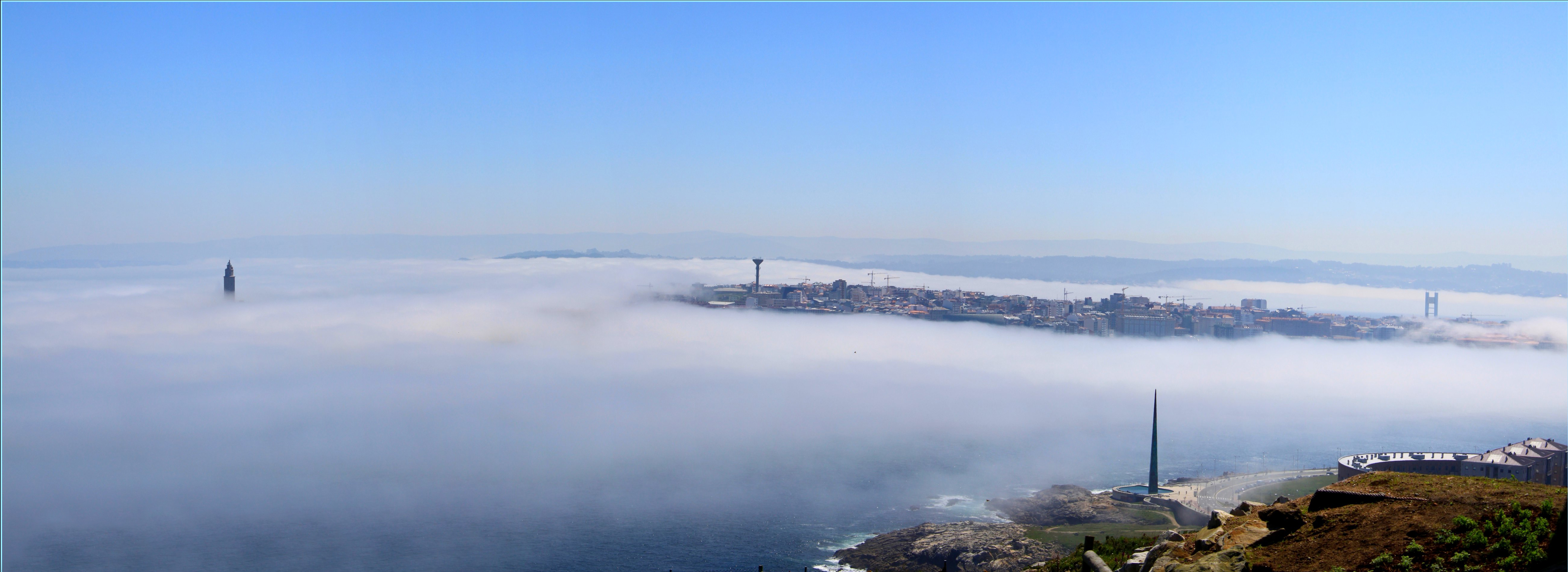 Cidade da Coruña nun mar de brétema - 31 de maio de 2009 - ás 11.30 am.